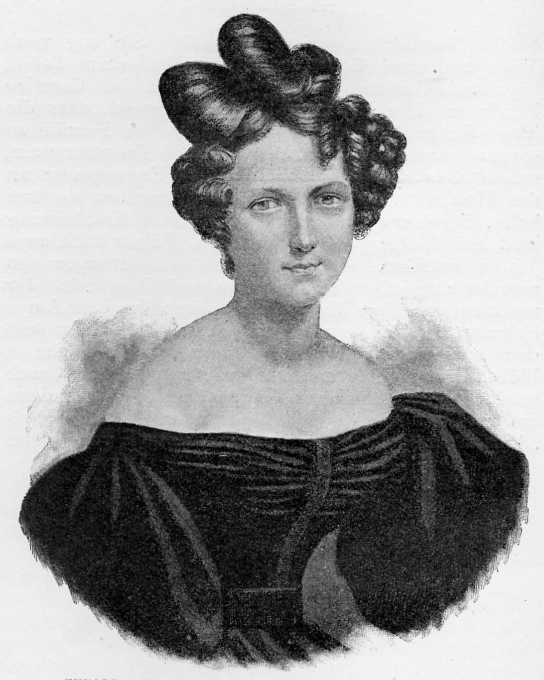 Wilhelmine Schröder-Devrient